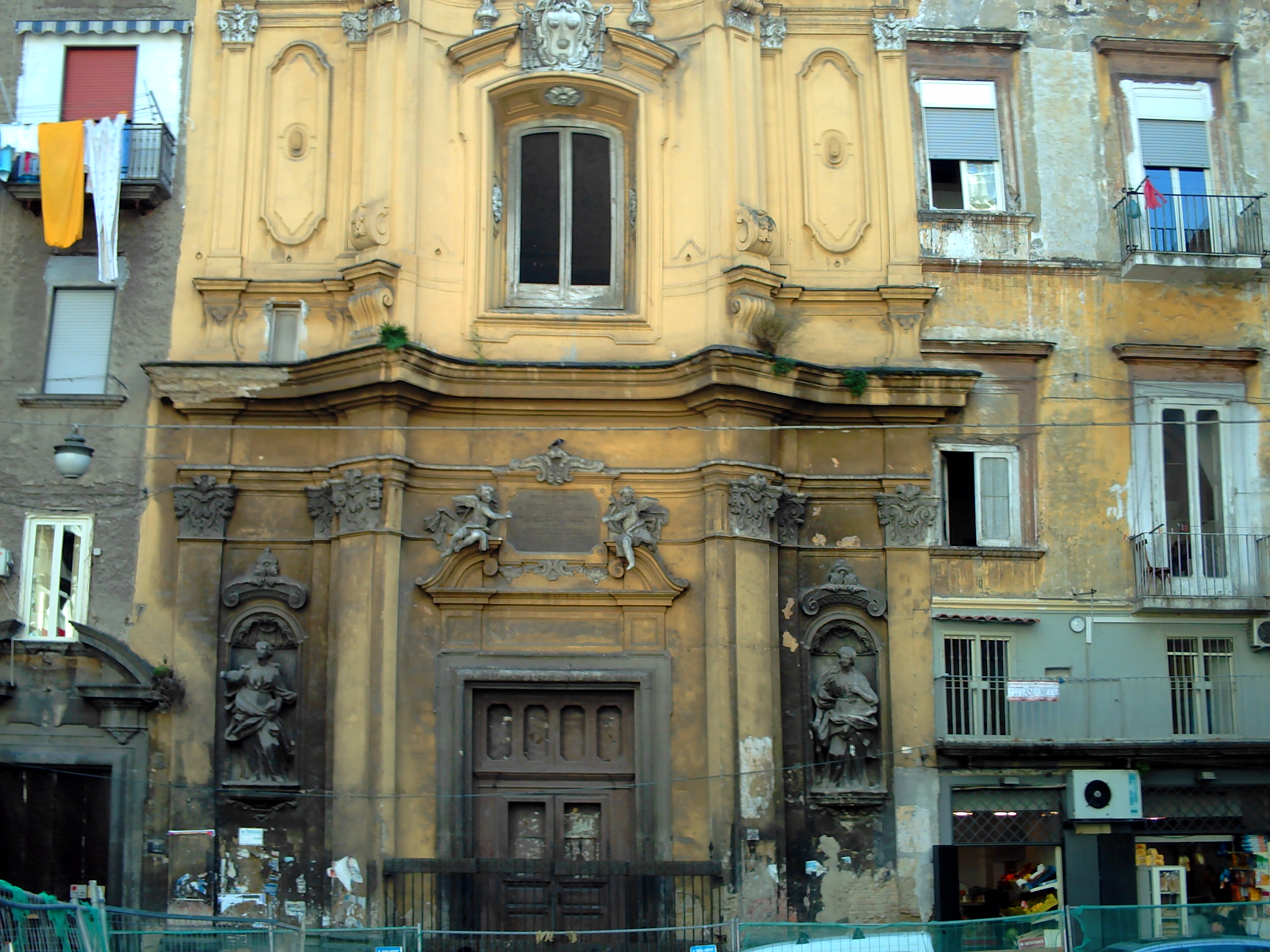 Facciata Santa Maria La Colonna